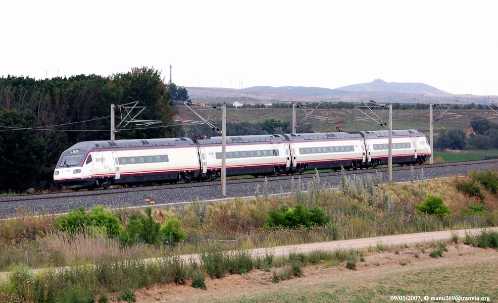 Electromotor 104 fabricada por Alstom / CAF, compuesta por las unidades 906C-506R-006R-006M, se dirigen con rapidez a su destino final en Madrid Puerta de Atocha.